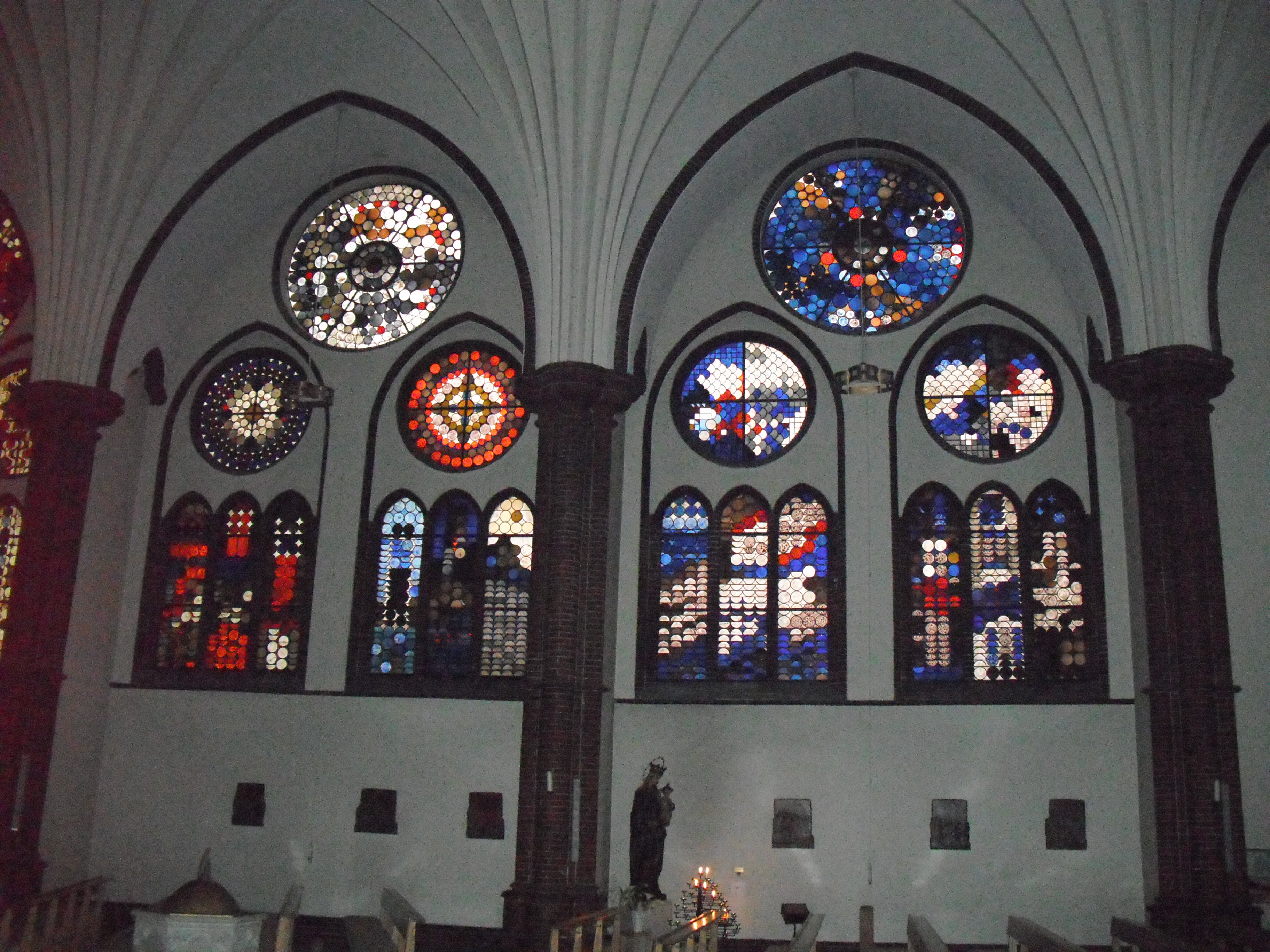 Fenster